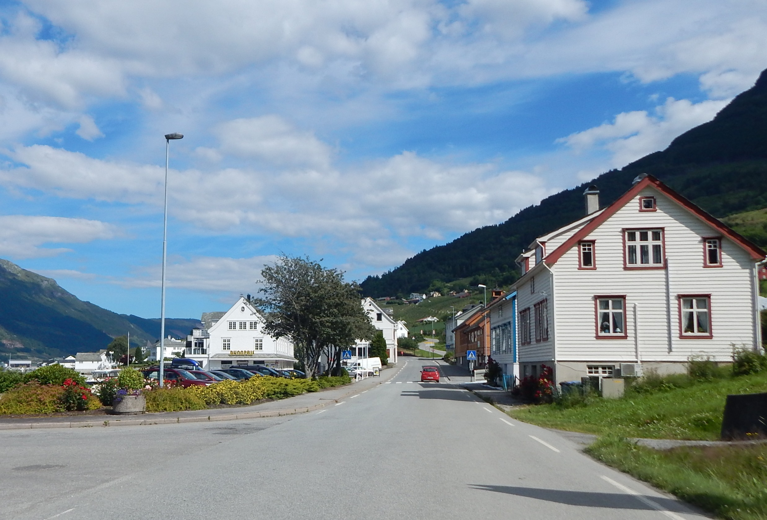 Riksvei 13 gjennom Lofthus